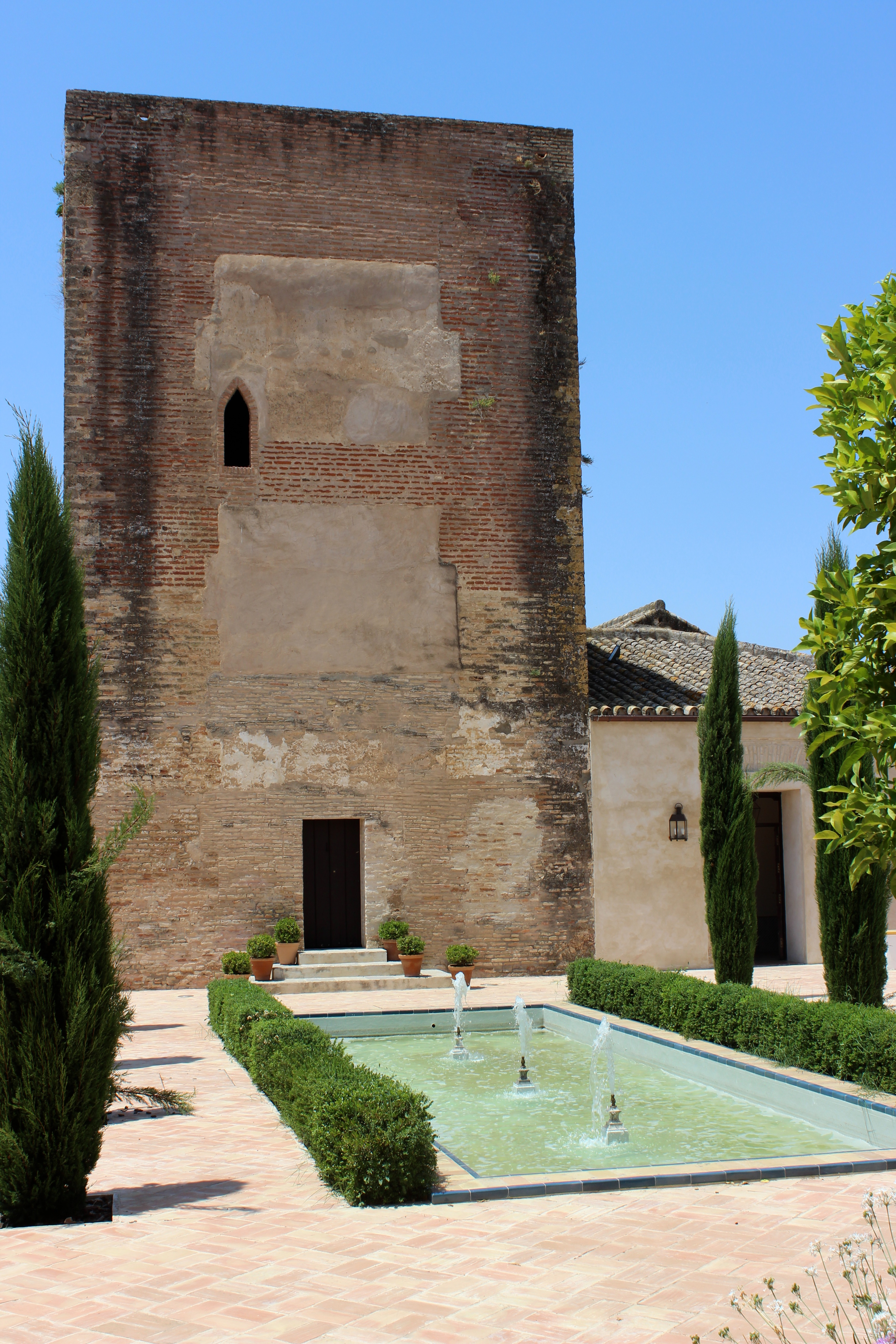 Espartinas. Convento de Nuestra Señora de Loreto.